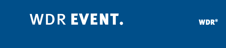 Logo von WDR EVENT. seit September 2012